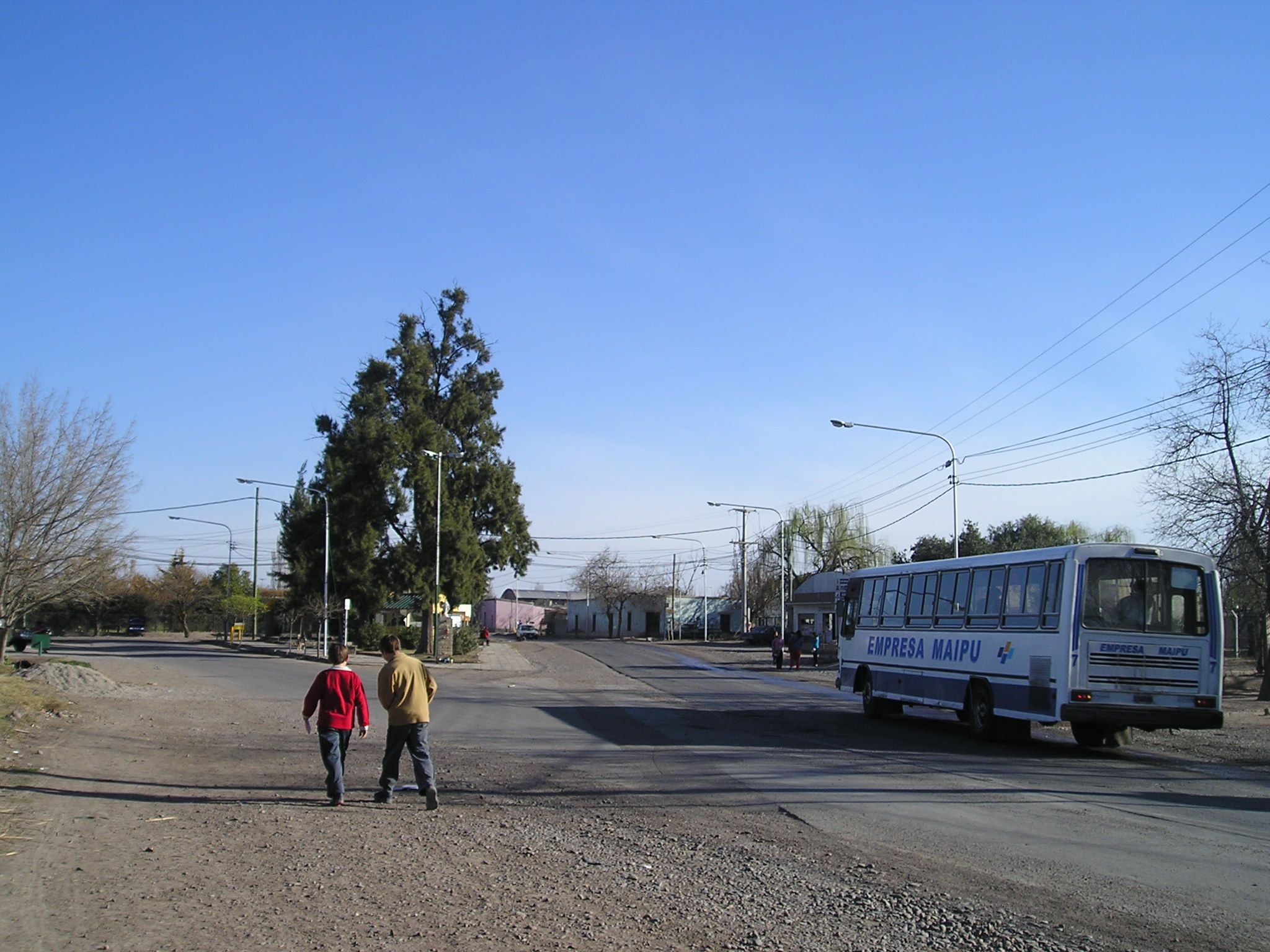 Plazoleta Rutini en Coquimbito, año 2002. Puede verse el omnibus 170 que une Coquimbito con Mendoza.